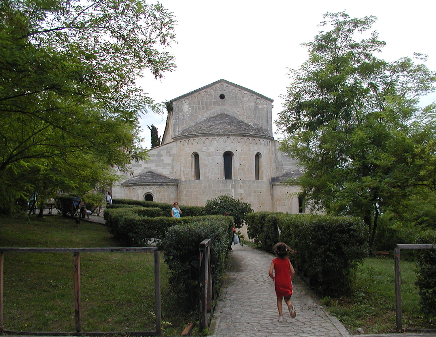 San Liberatore a Majella